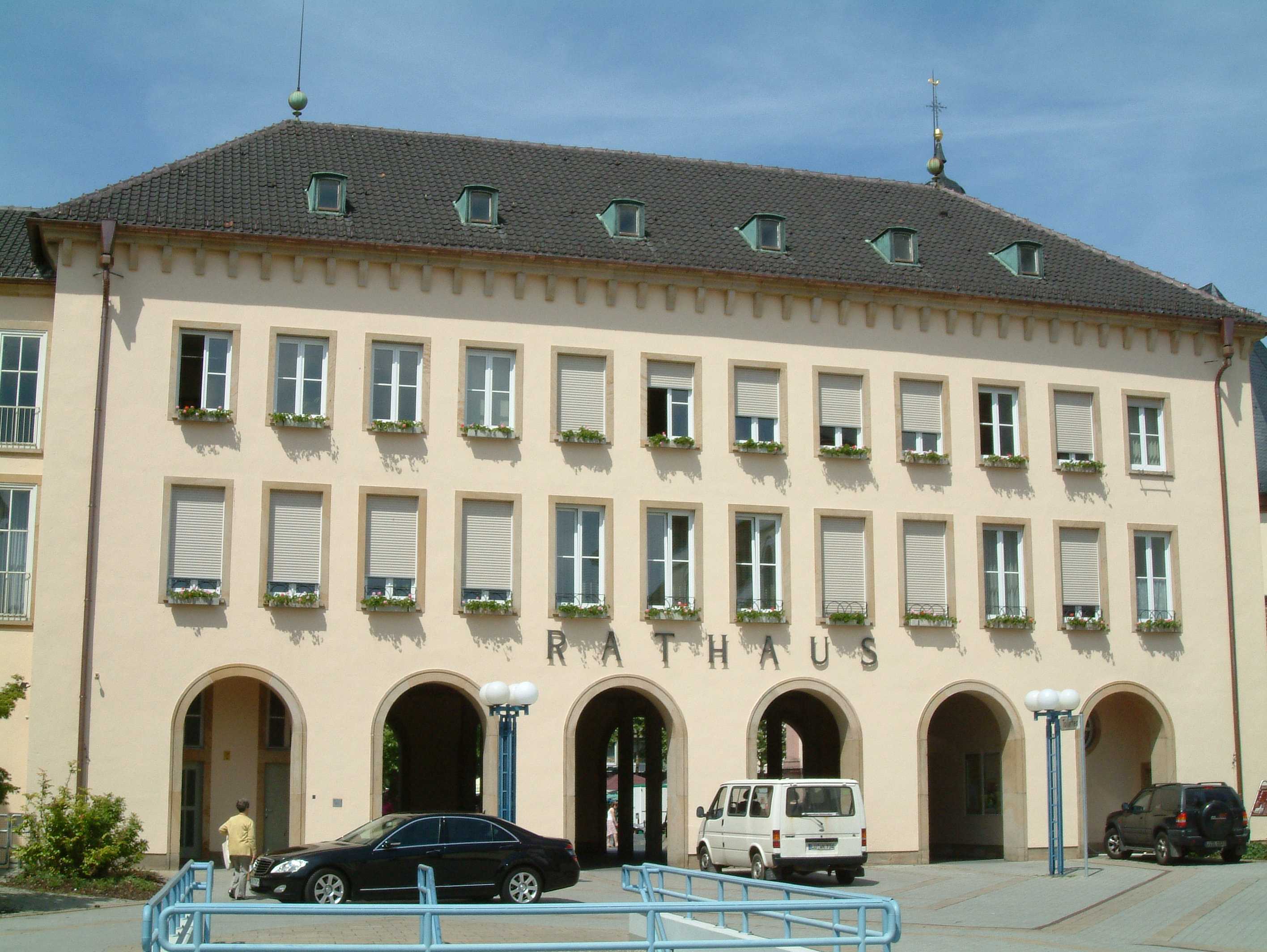 Rathaus zu Frankenthal (Pfalz), selbst fotografiert am 2006-06-09 und freigegeben durch Benutzer:Mundartpoet